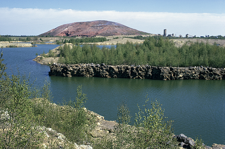 100 meter hög slagghög sedd från avstånd. Bilden troligen från mitten av 1970-talet.